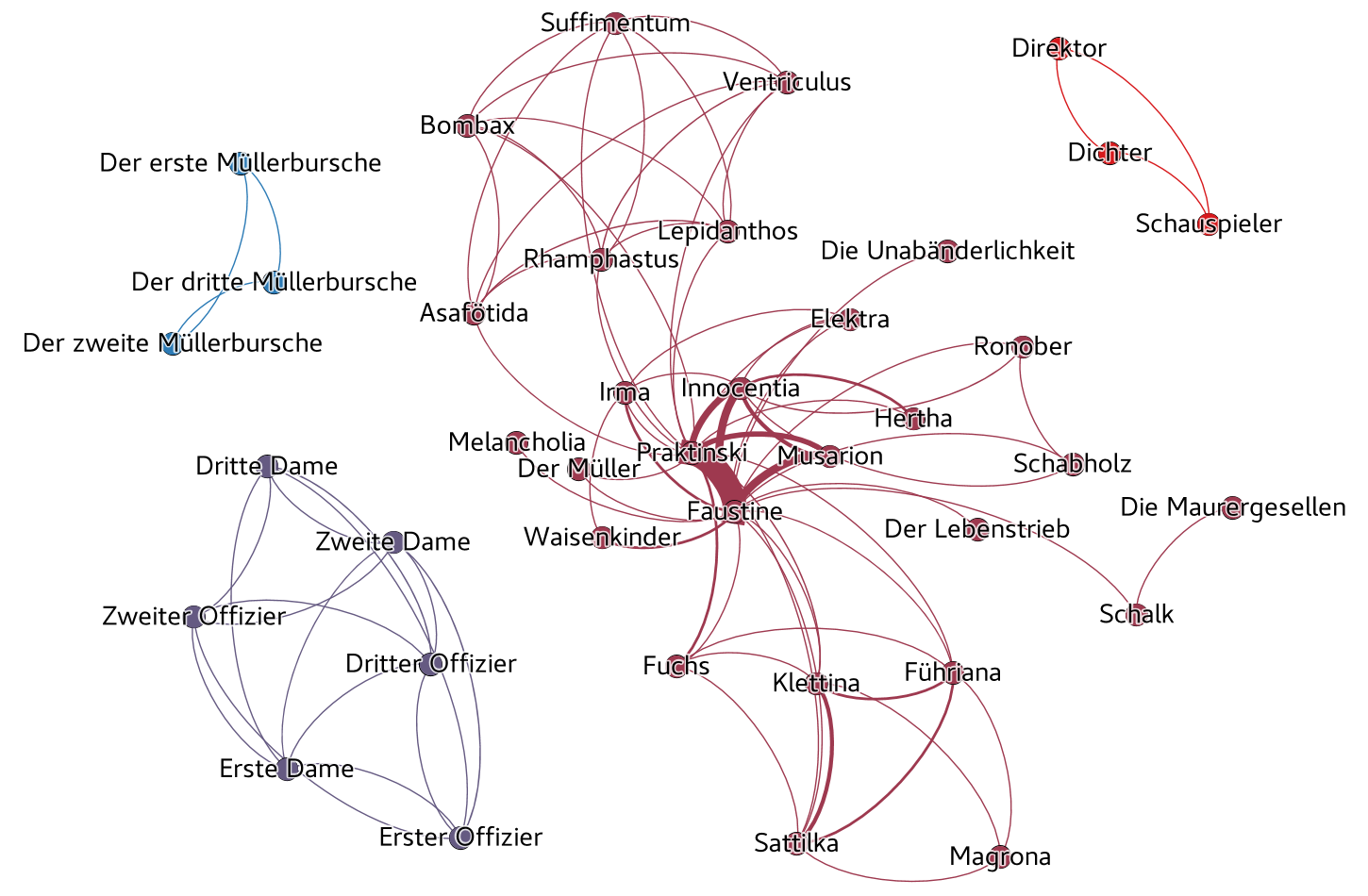 Netzwerkgraph zum Drama „Faustine, der weibliche Faust“ (1898) von Wilhelm Schaefer.